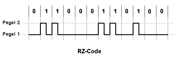 RZ-Kodierung Andere Versionen: NRZ-L-Kodierung, NRZ-I-Kodierung, NRZ-S-Kodierung